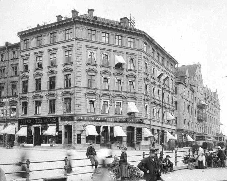 Kornhamnstorg 61, Arbetareringens Bank. Byggnaden ombyggdes 1877-78 för kontor och fick ny fasad av J F Åbom